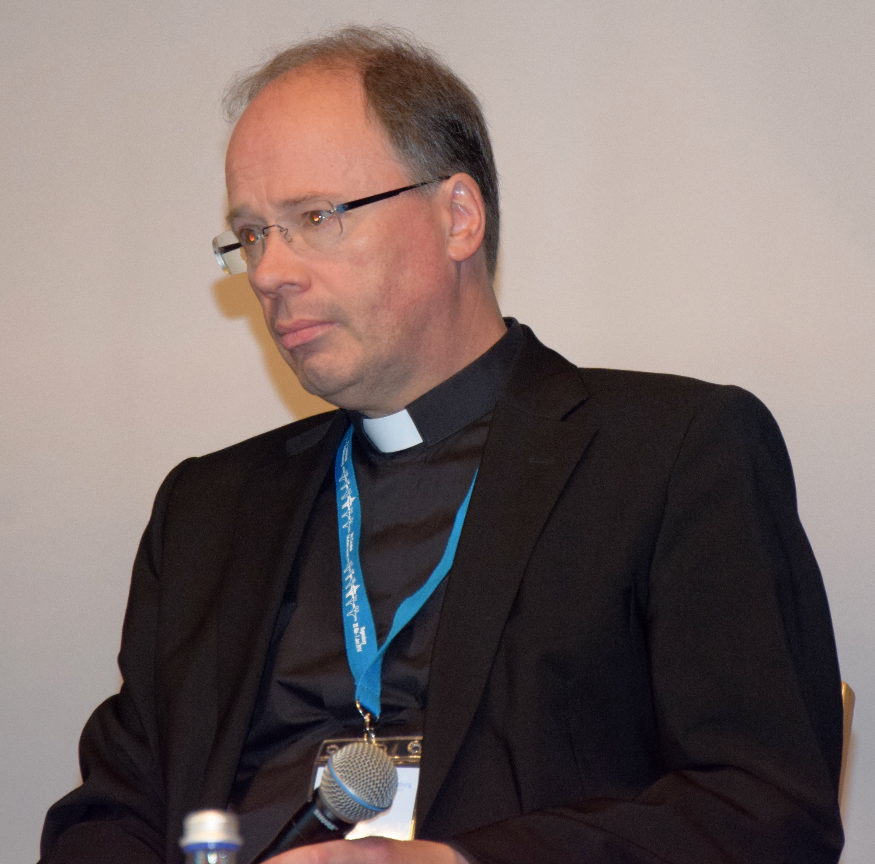 Bischof Dr. Stephan Ackermann, Beauftragter der DBK für Fragen sexuellen Missbrauchs Minderjähriger im kirchlichen Bereich, Trier, Podium "Kirche auf dem Weg zu einer Kultur der Achtsamkeit?", 99. Deutscher Katholikentag in Regensburg